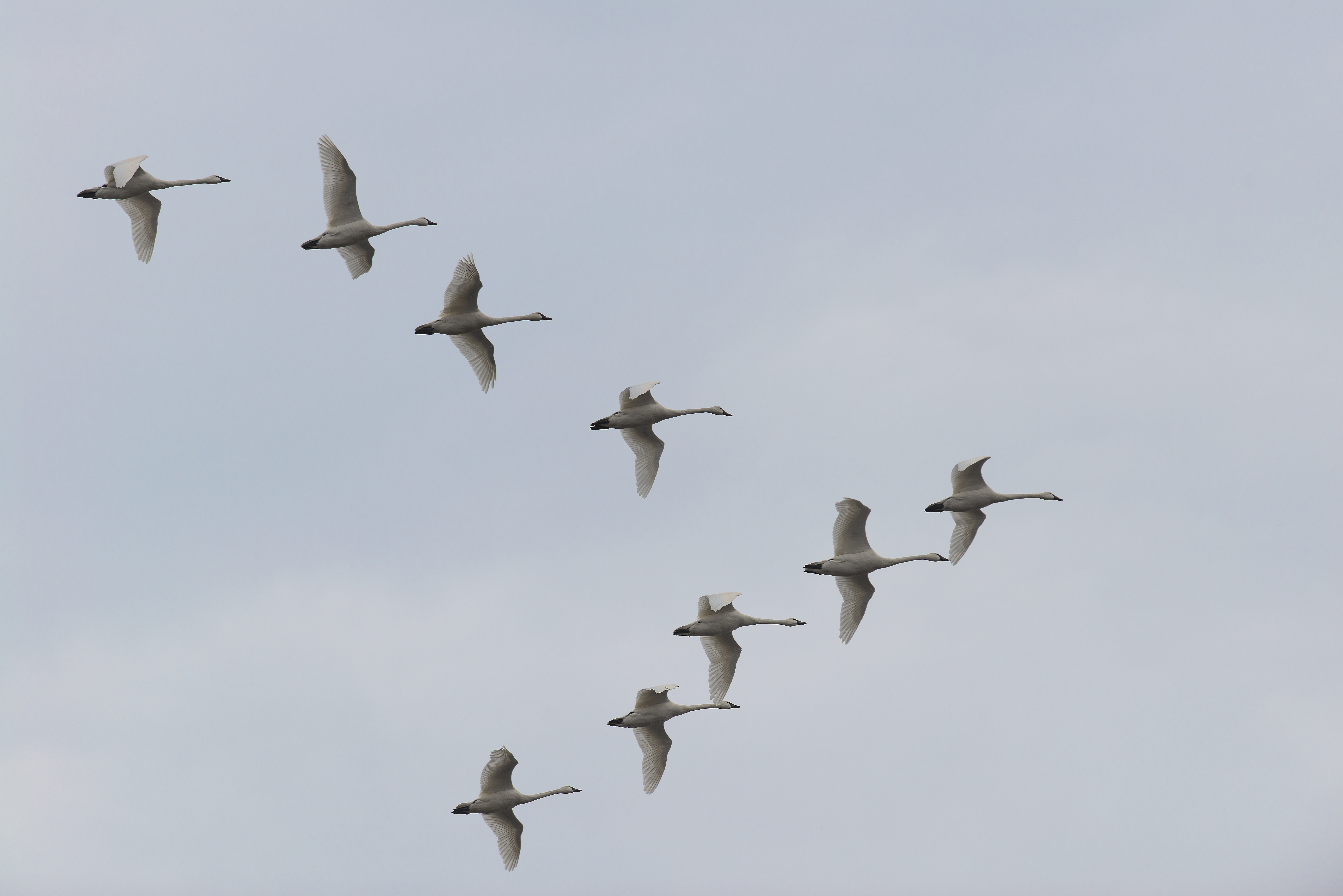 tundra swans on wing blackwater